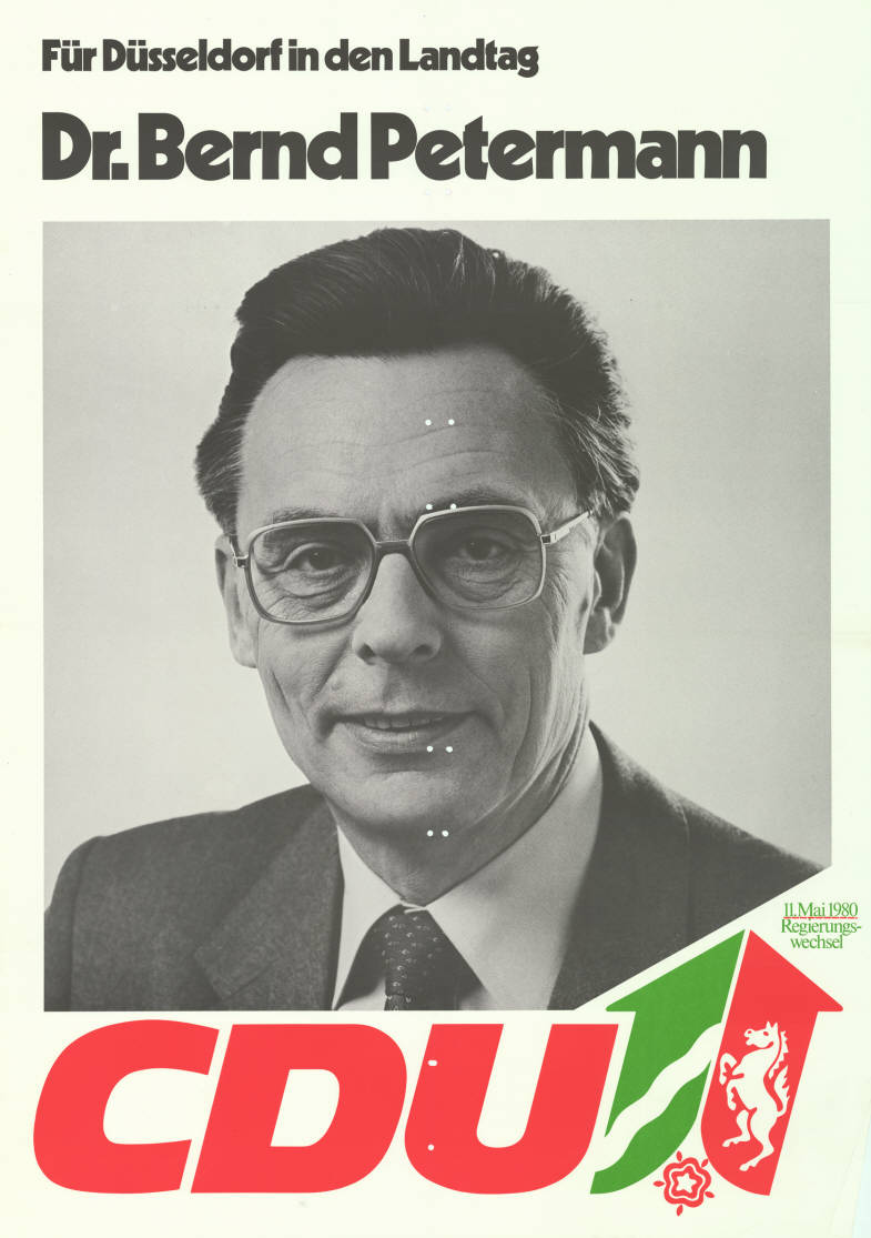 Für Düsseldorf in den Landtag Dr. Bernd Petermann 11. Mai 1980 Regierungs- wechsel CDU Abbildung: Porträtfoto Kommentar: Rote Beschriftung auf der Rückseite. Plakatart: Kandidaten-/Personenplakat mit Porträt Objekt-Signatur: 10-009 : 842 Bestand: Landtagswahlplakate Nordrhein-Westfalen (10-009) GliederungBestand10-18: Landtagswahlplakate Nordrhein-Westfalen (10-009) » CDU Lizenz: KAS/ACDP 10-009 : 842 CC-BY-SA 3.0 DE